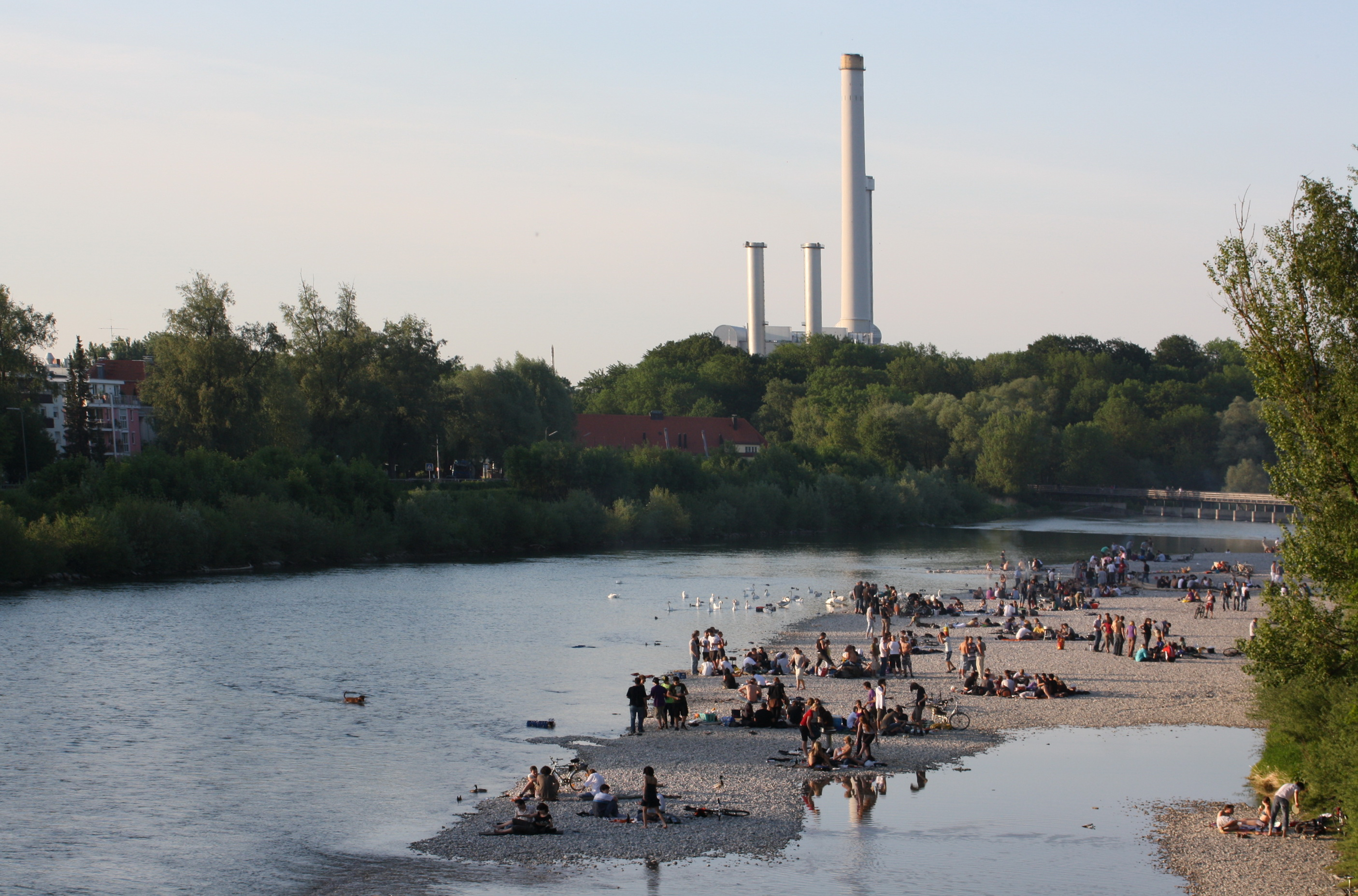 München - Isar im Bereich des Flauchers.